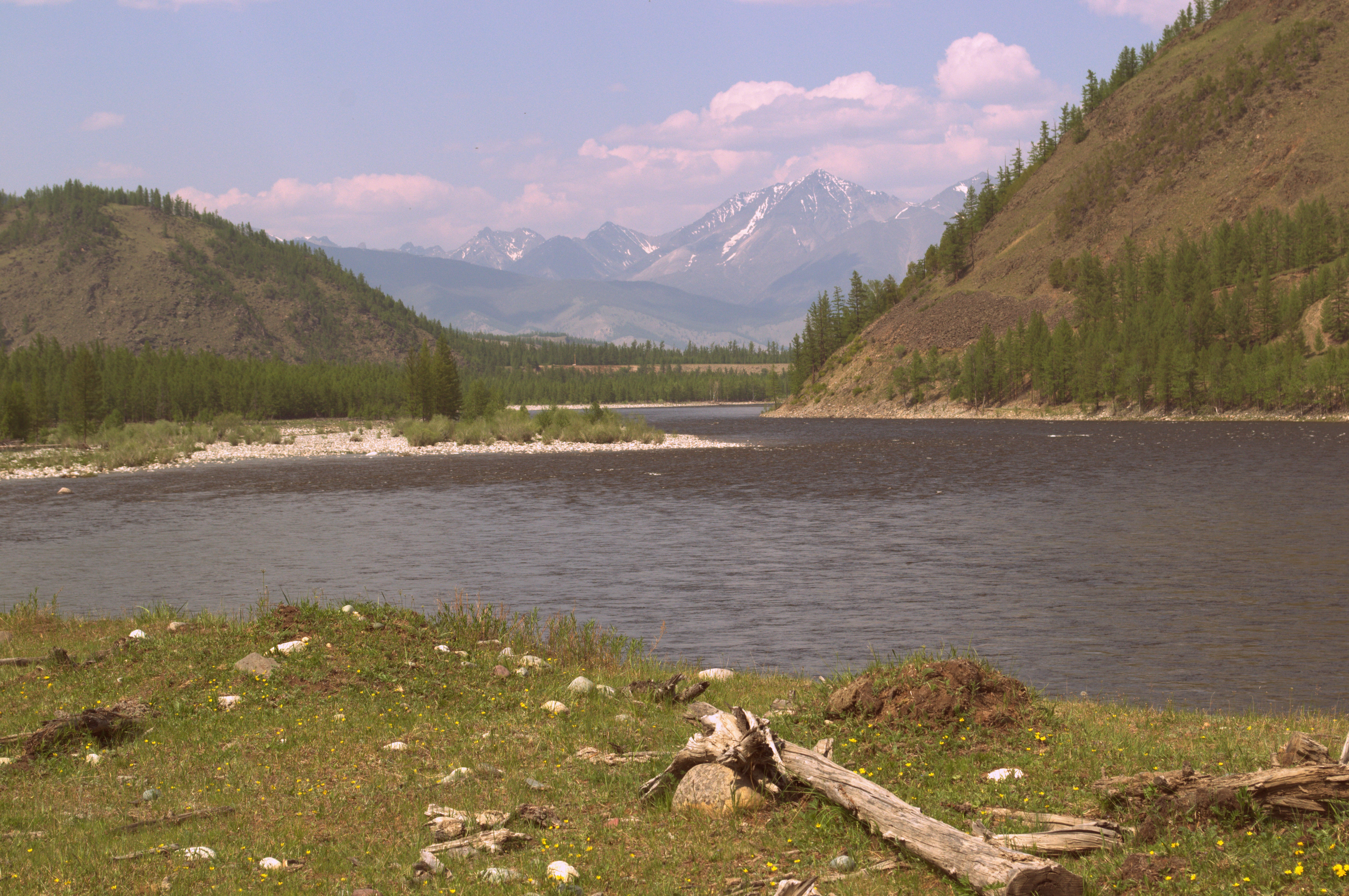 Пейзаж в окрестностях Орлика. Окинский район Бурятии, Забайкалье